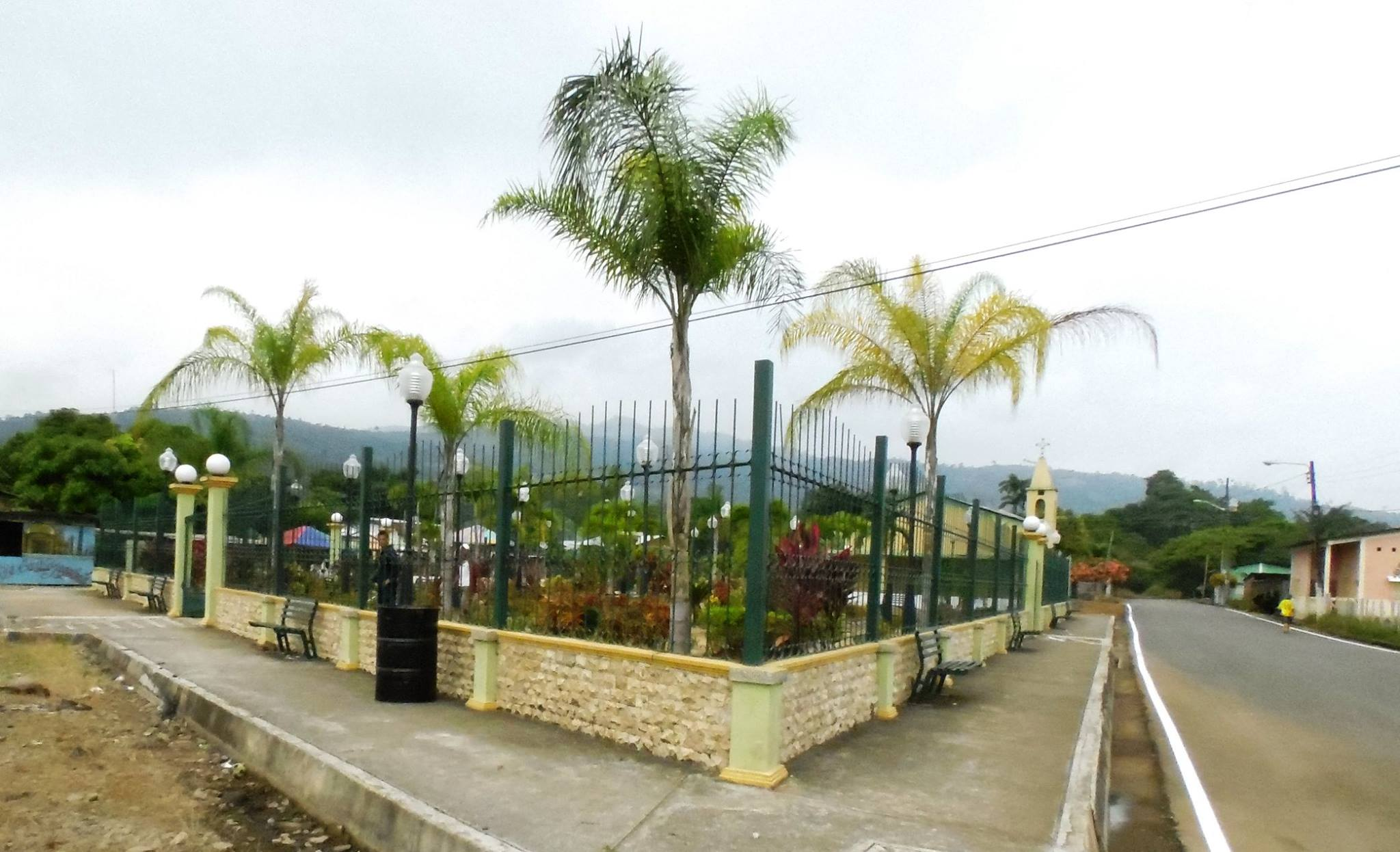 Parque de Chacarita